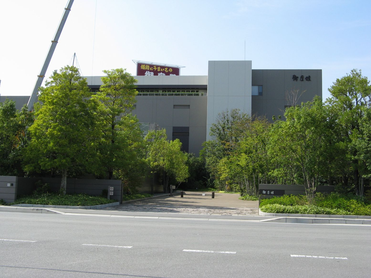 御座候本社